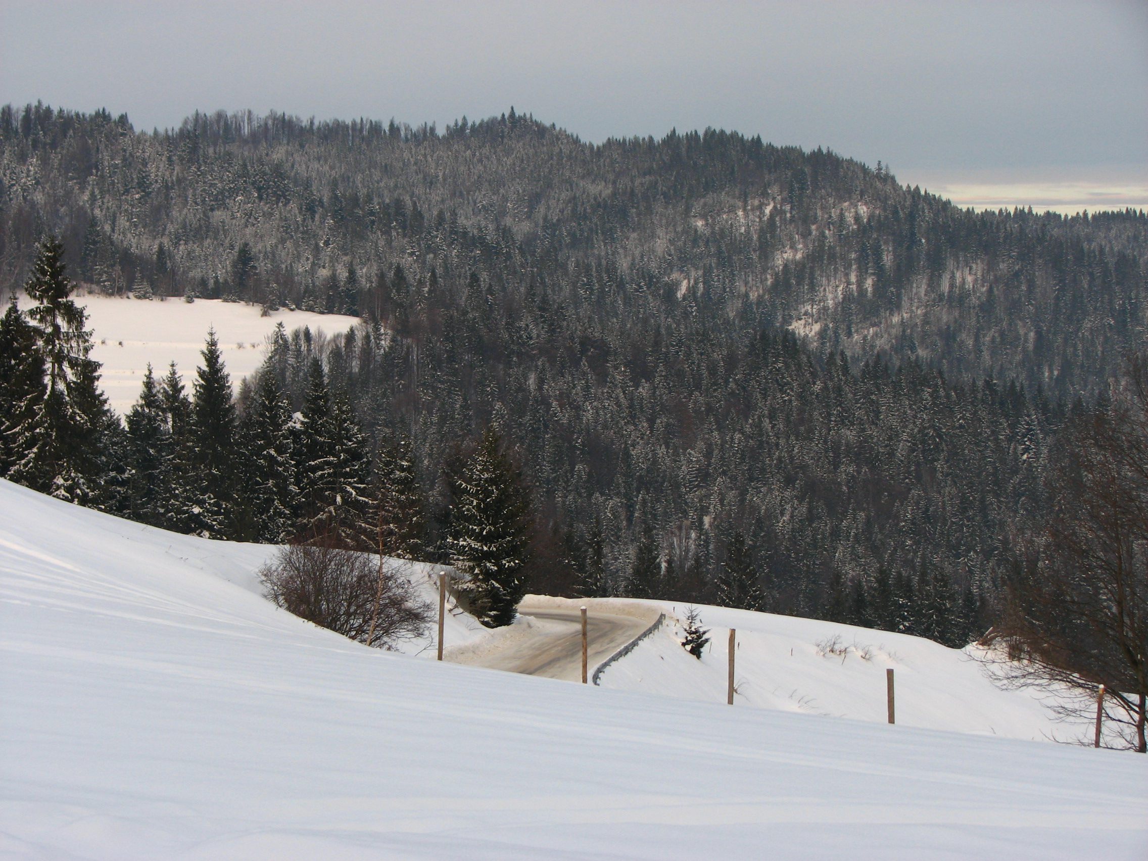 Widok na Drogę Knurowską z Przełęczy Knurowskiej.